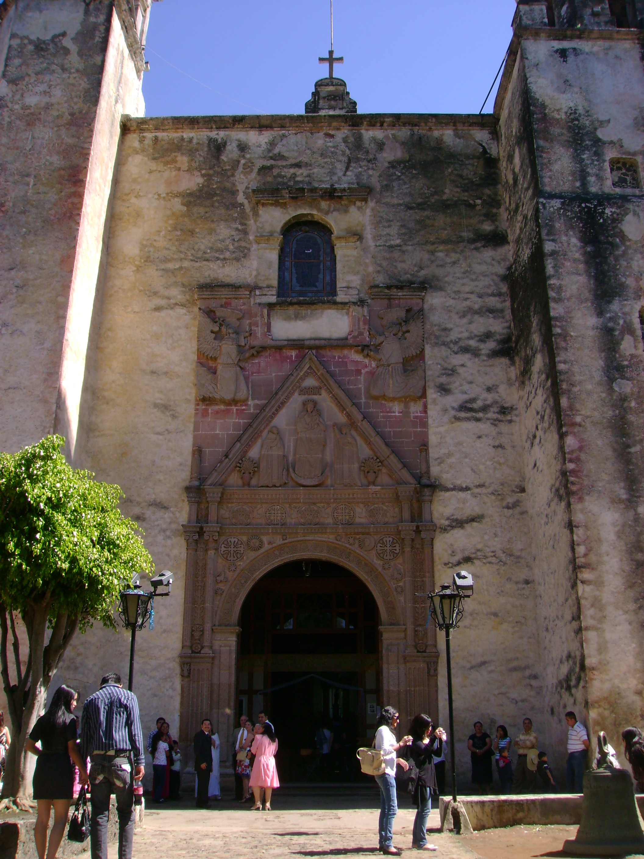 Templo y Antiguo Convento de la Natividad